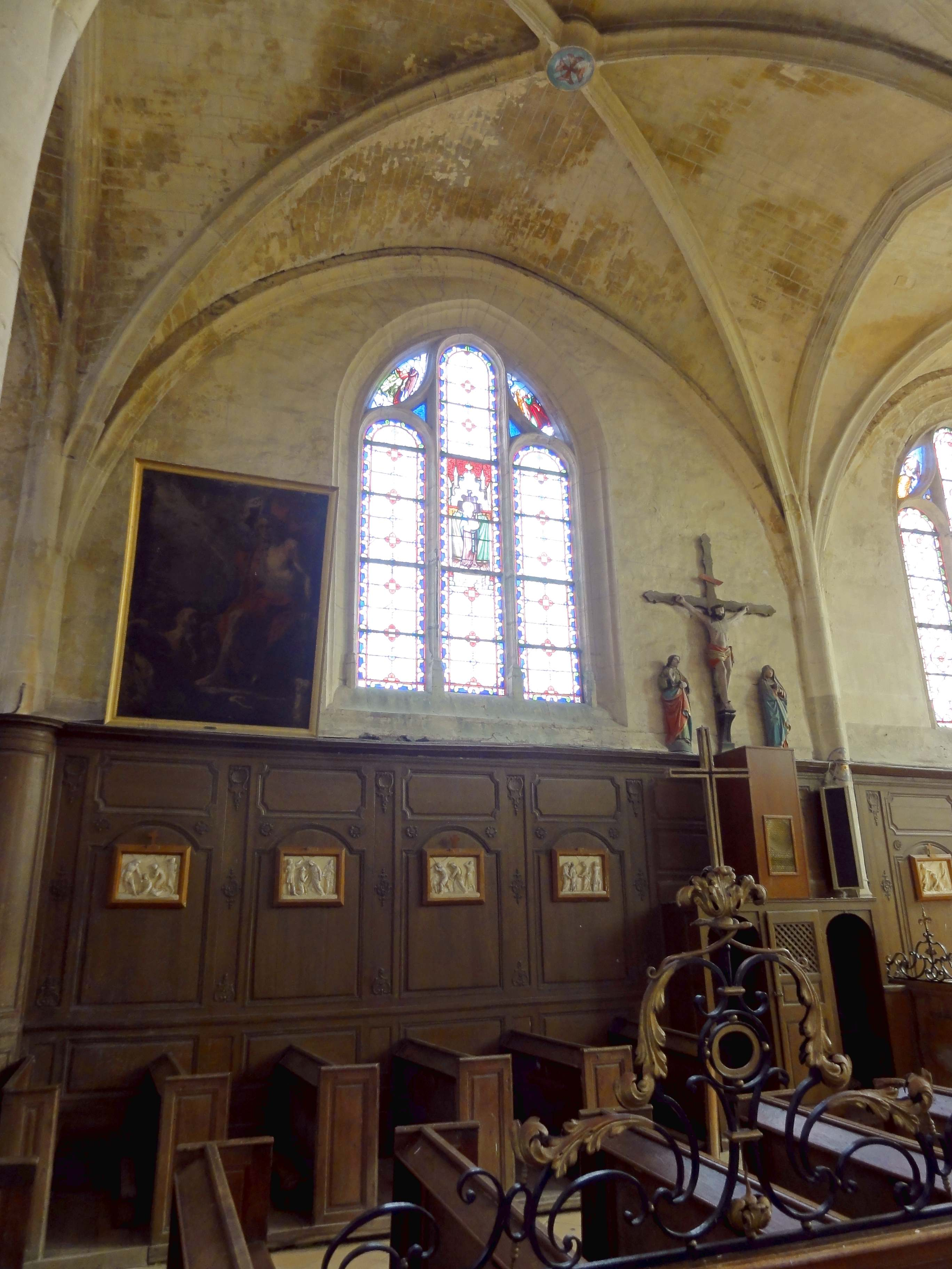 Intérieur de l'église Saint-Martin de Versigny (voir titre).